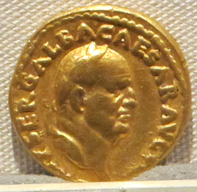 Palazzo Massimo alle Terme